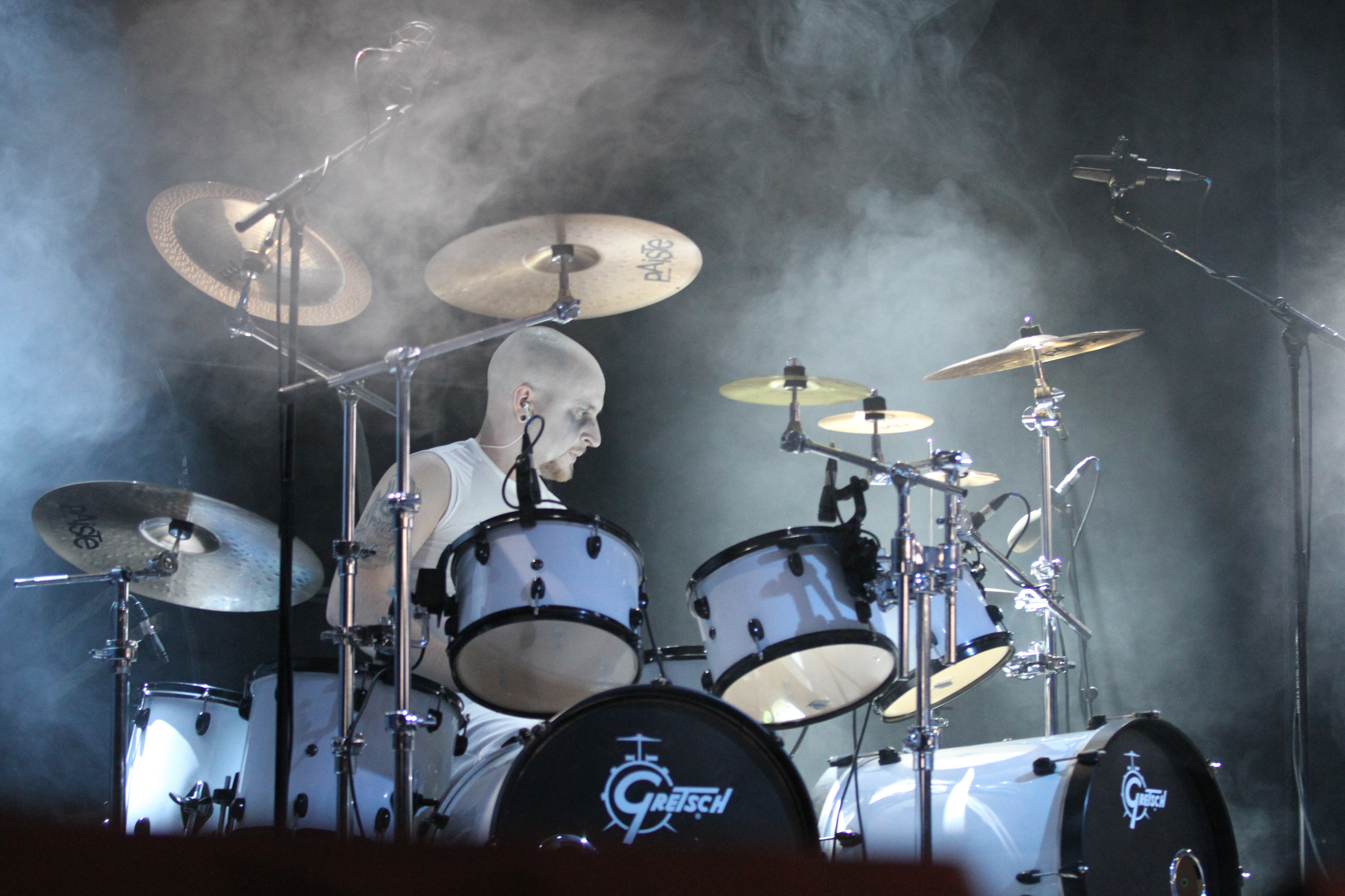 Stephan Hauer von Das Ich auf dem Wave-Gotik-Treffen 2013 in der Agra-Halle.